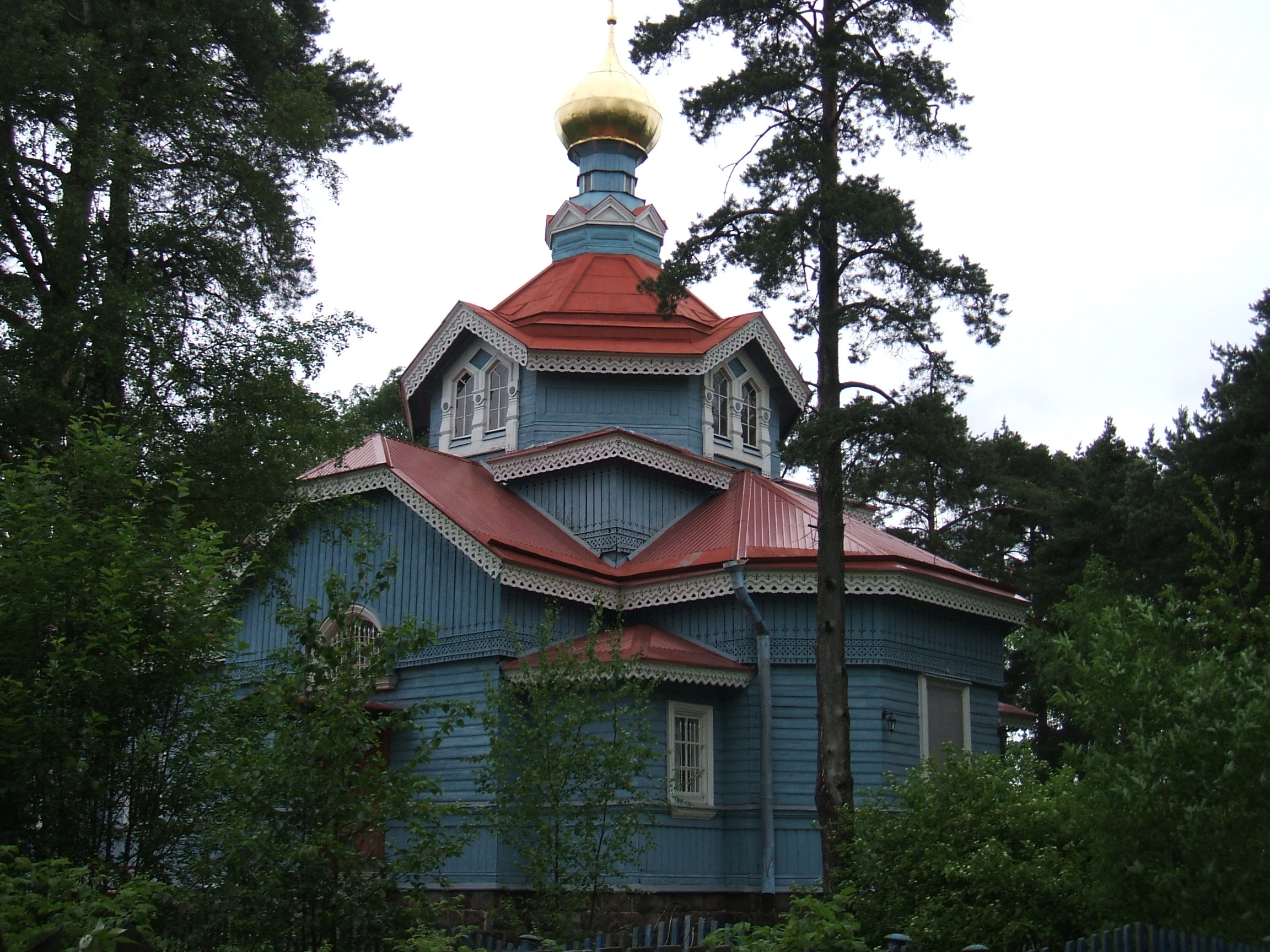 Южный фасад церквп св.ап.Петра в Лахте СПб